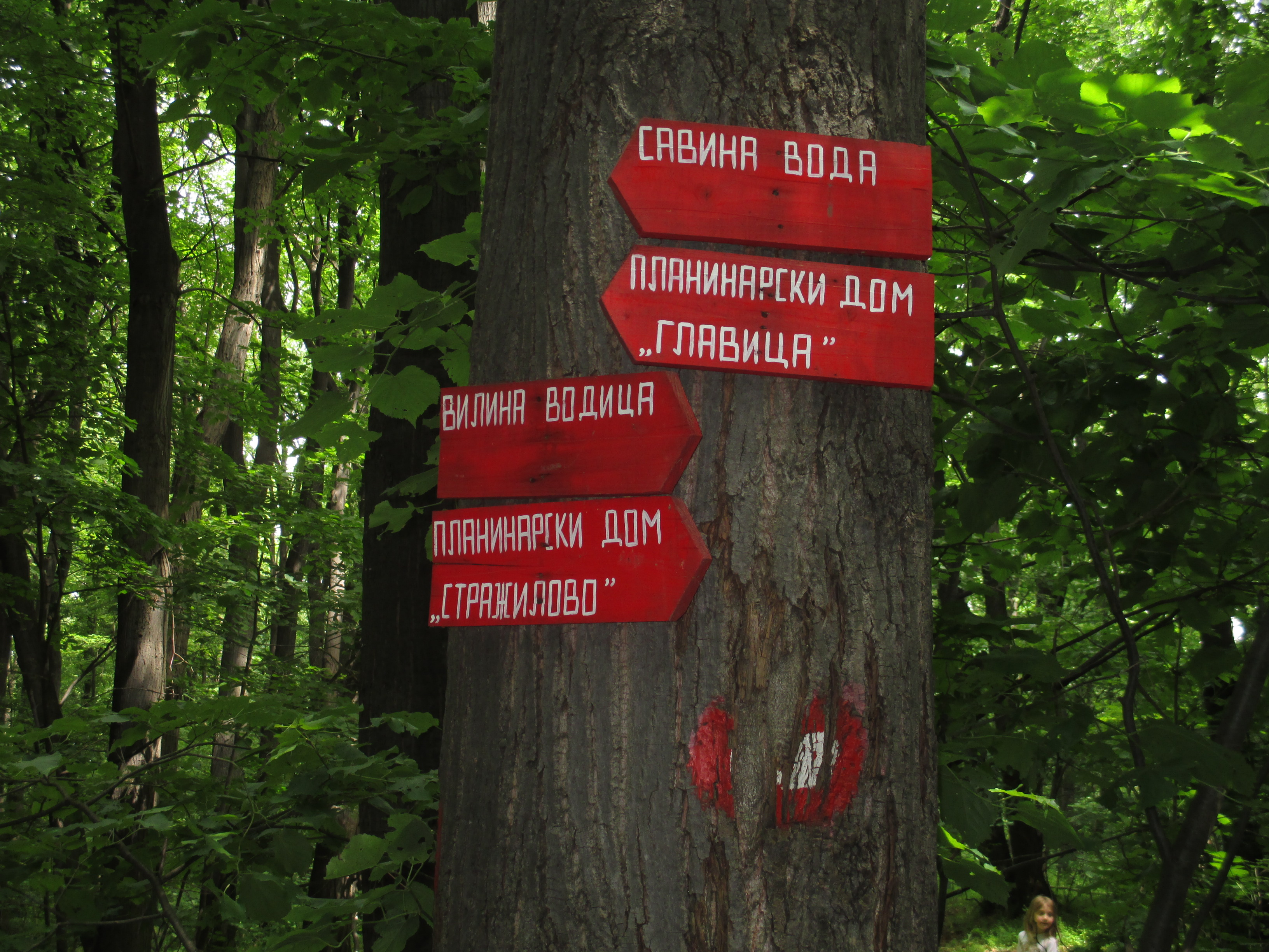 Ово је фотографија заштићеног природног добра у Србији под шифром: НП01 This is a a photo of a natural area in Serbia with ID: НП01 Fruška gora - putokazi na šumskim stazama